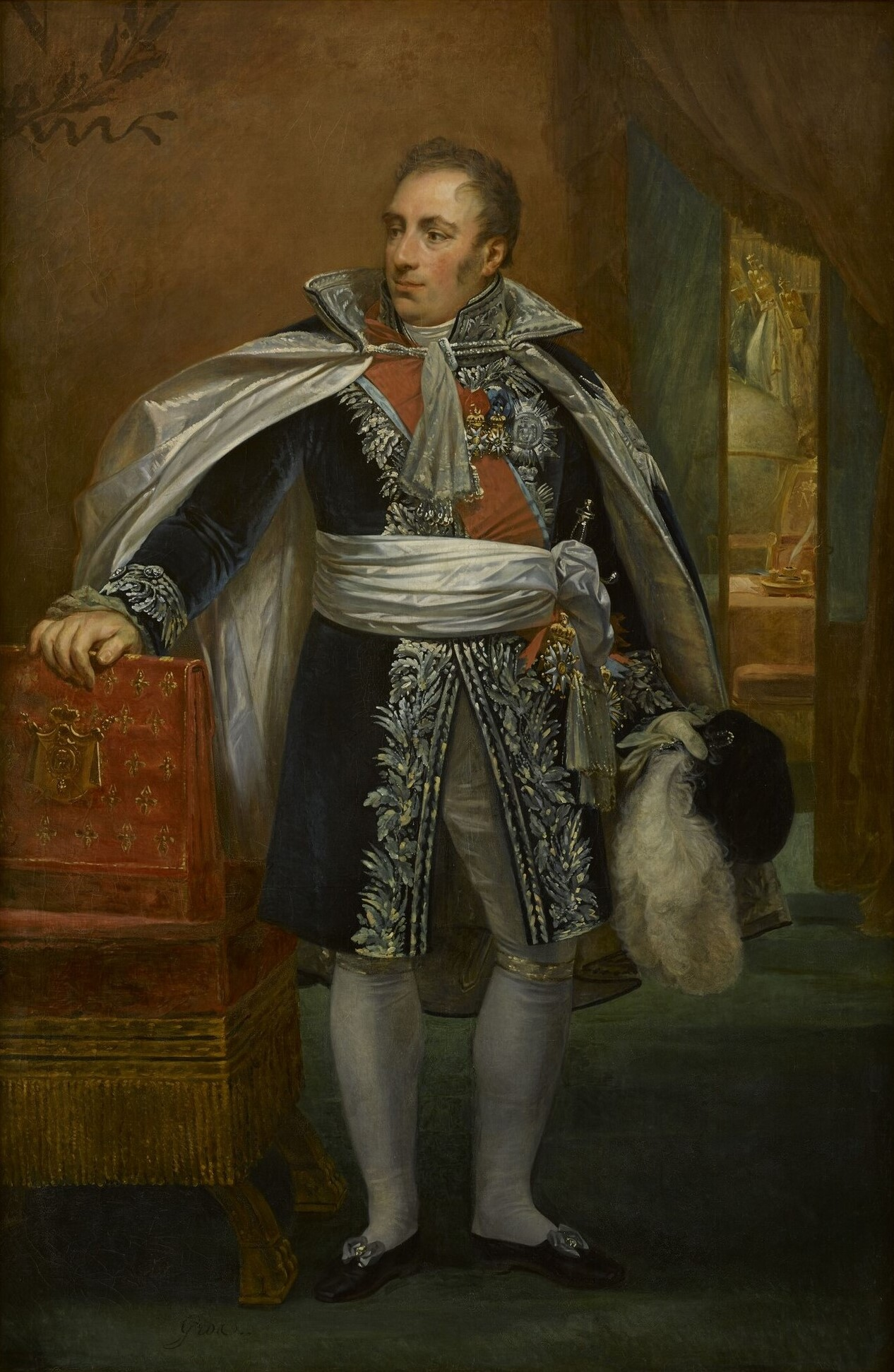 Detail of a portrait of Pierre Antoine Noël Bruno, comte Daru, also known as Pierre Daru (1767-1829), by Antoine-Jean Gros. Musée national des châteaux de Versailles et de Trianon. Pendant le Premier Empire, Daru est l'organisateur du ravitaillement de l'armée impériale.